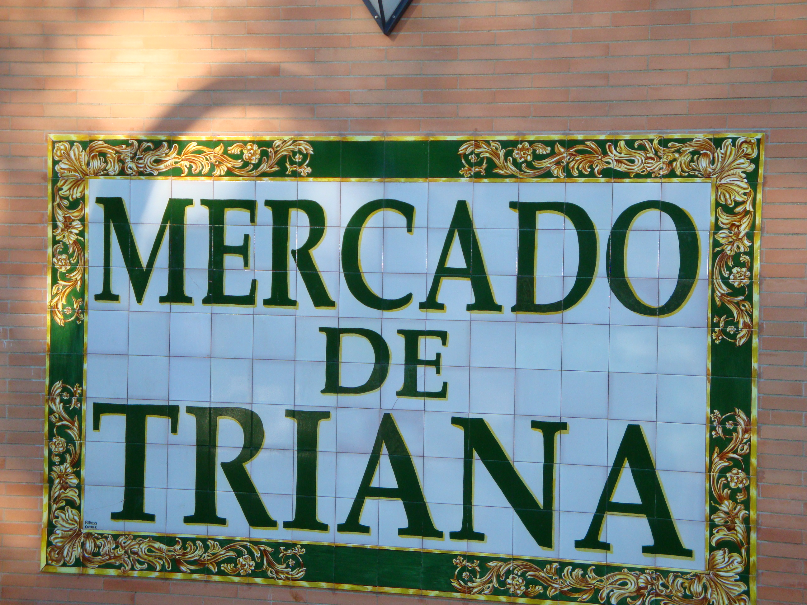 Mosaico del mercado de Triana (Sevilla)